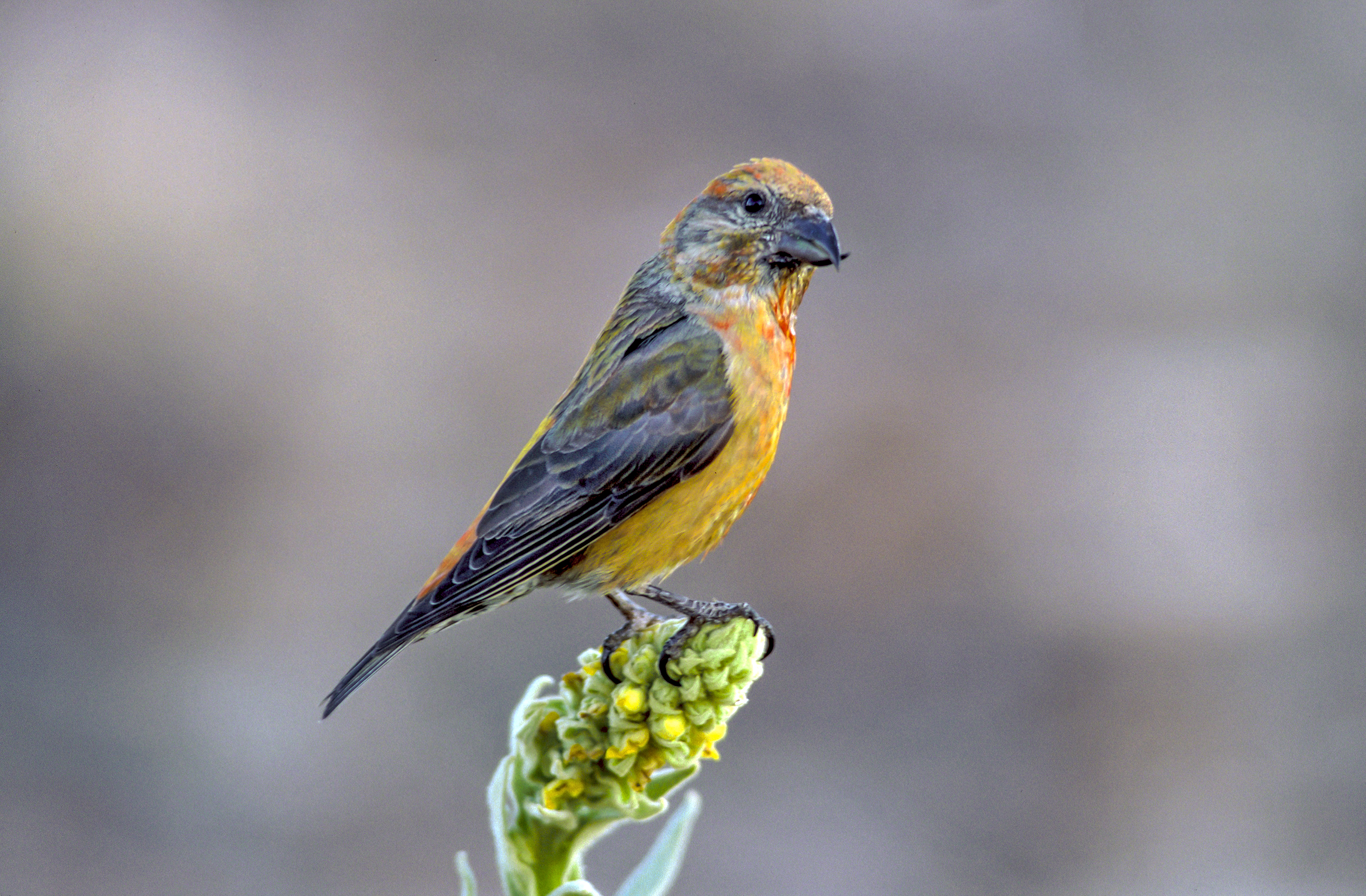 Red Crossbill (Loxia curvirostra)